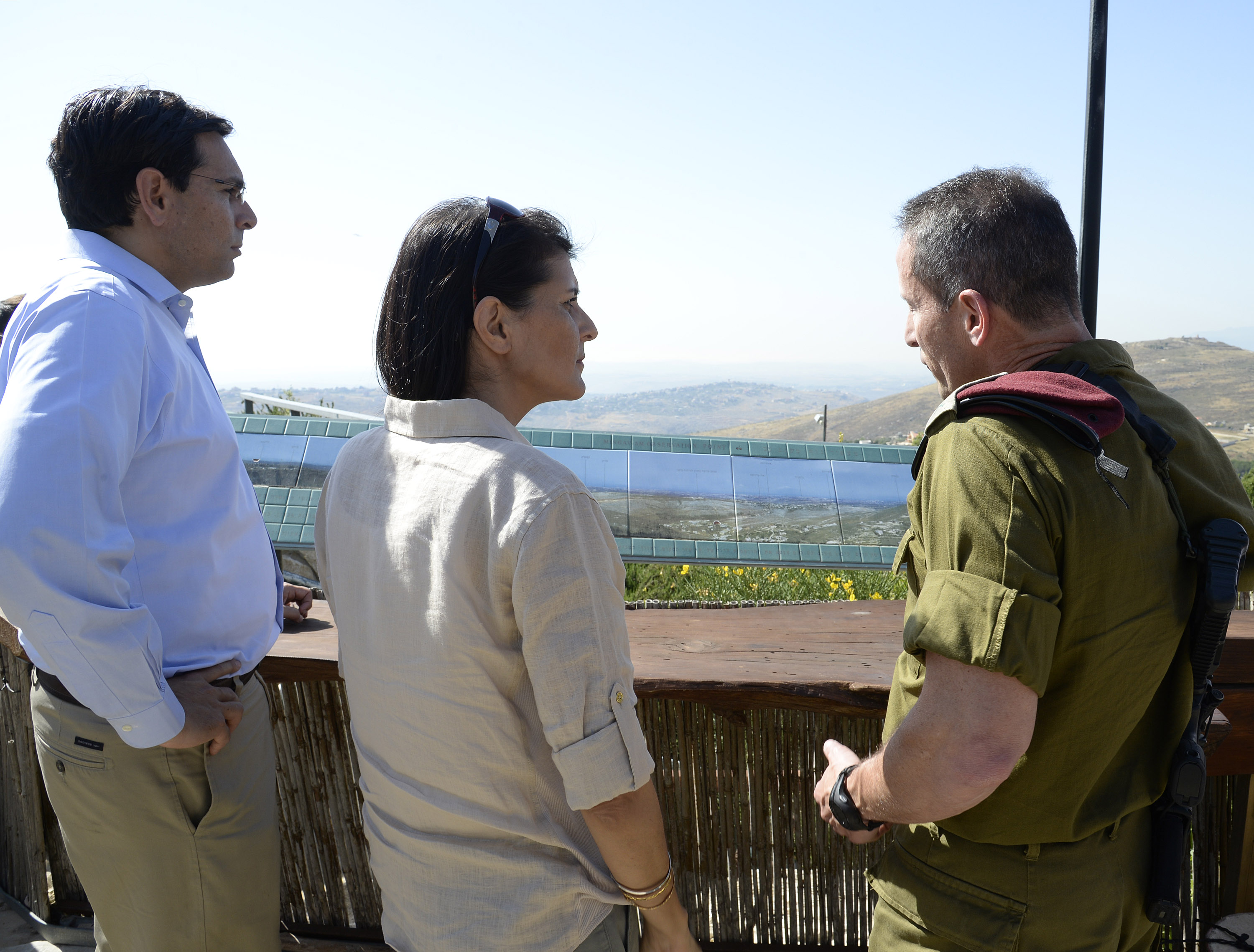 _PDA3248P